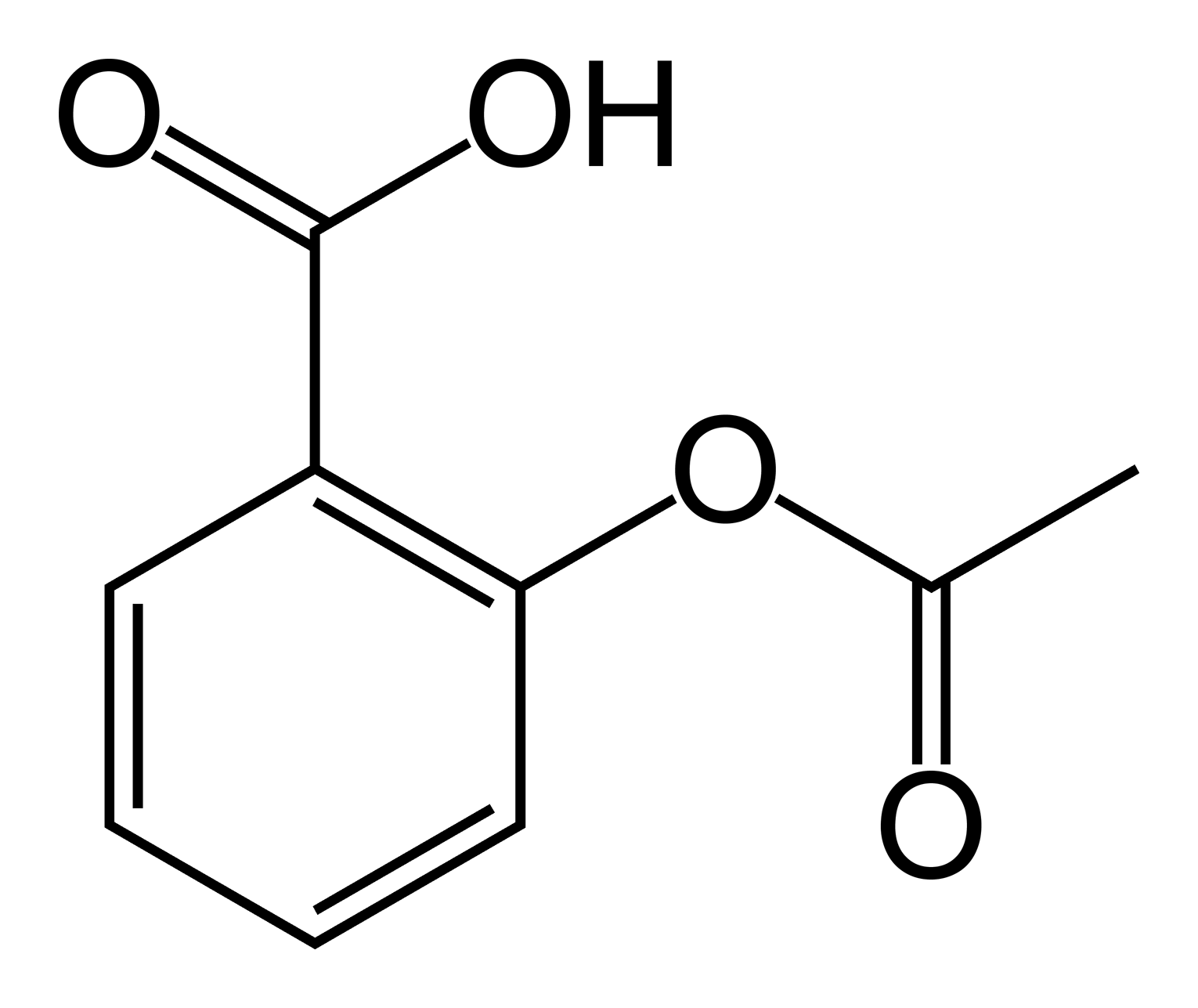 Aspirine